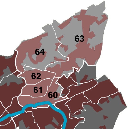 Quartiere in Wuppertal-Oberbarmen selbst erstellt von Pitichinaccio 23:22, 30 November 2005 (UTC)